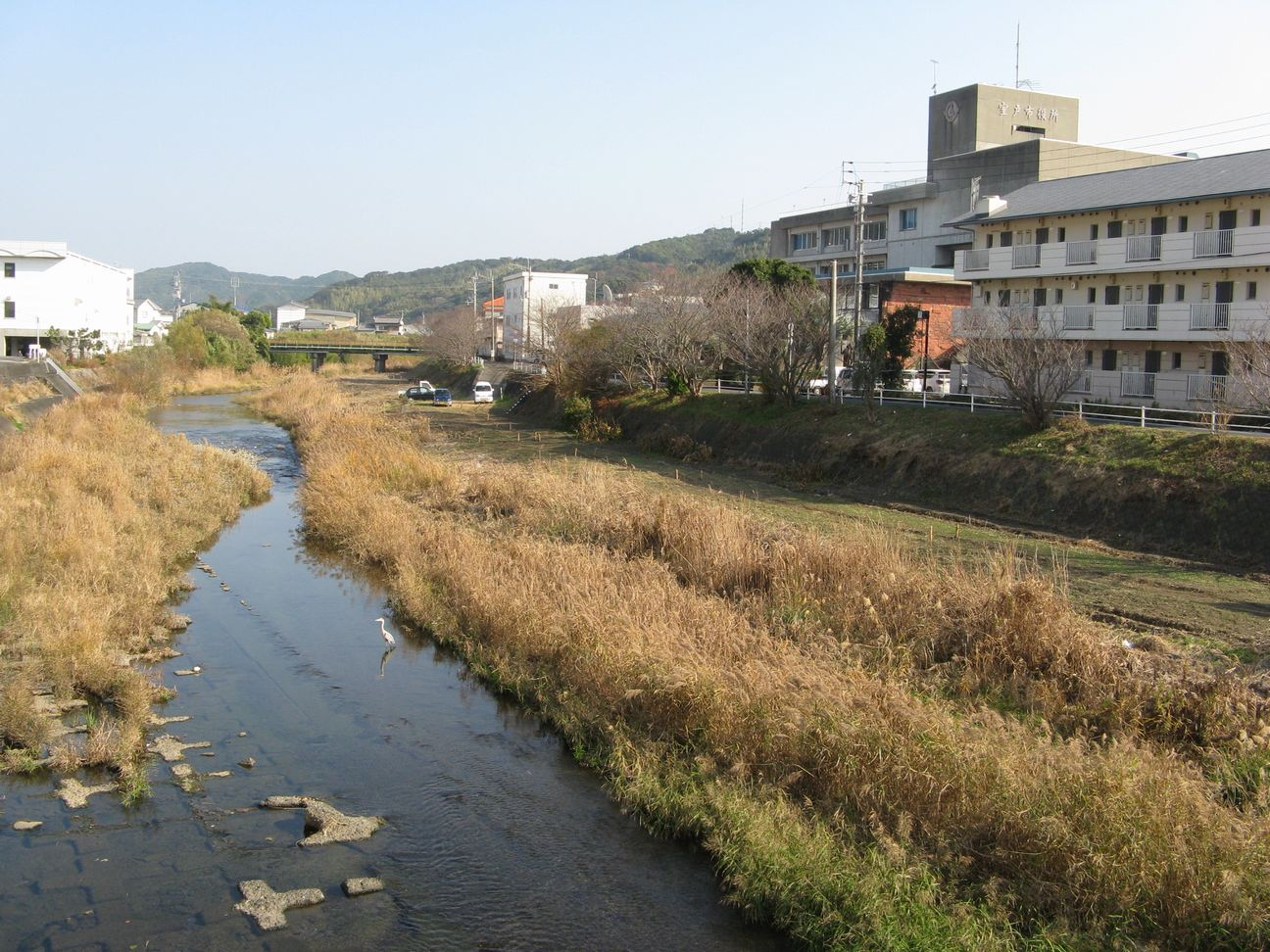 室津川 室戸大橋から北望 右奥は室戸市役所